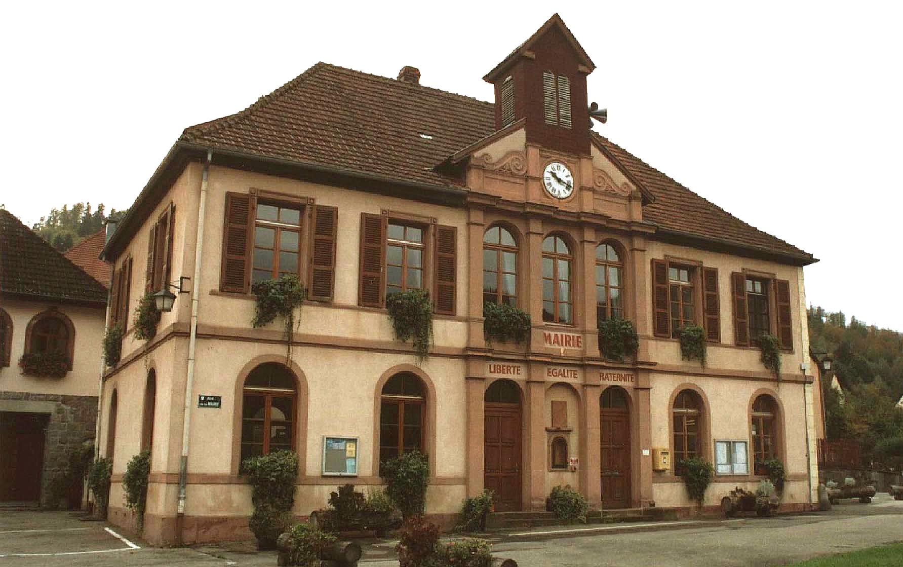 Mairie de Luttenbach Photo : Samuel Wernain (25 octobre 2006).